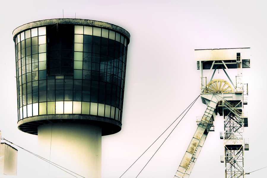 Těžní věž dolu Staric